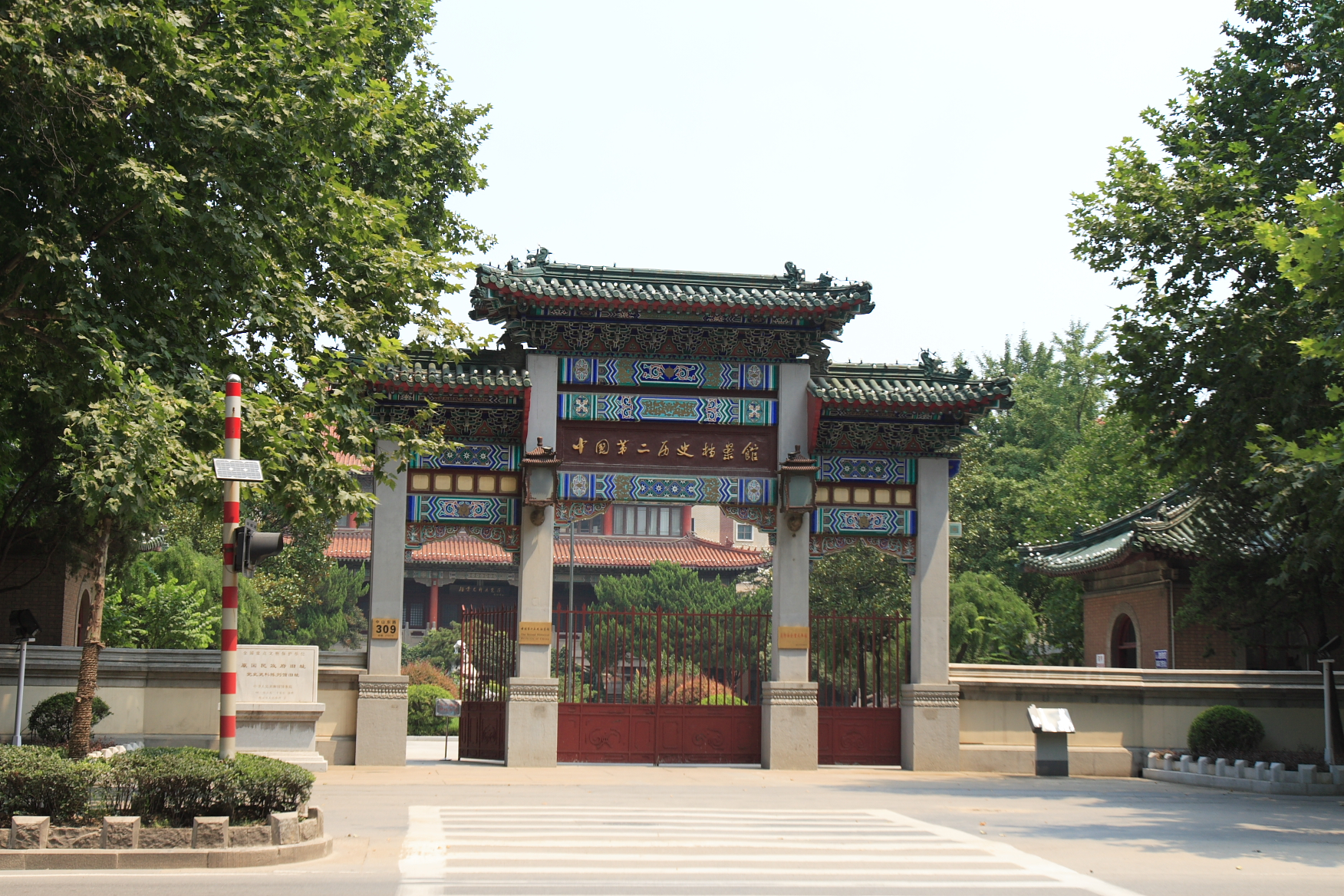 中国第二历史档案馆